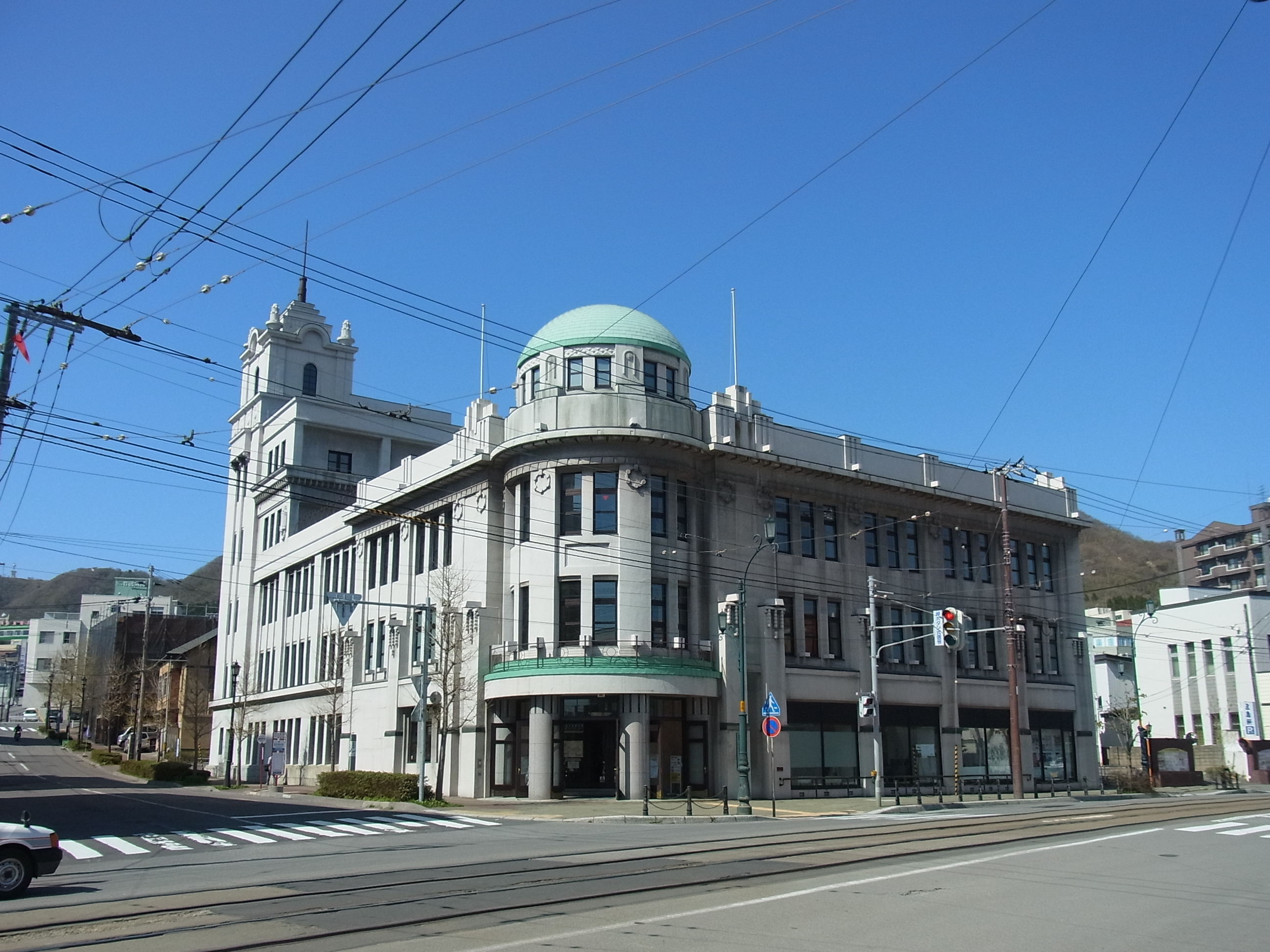 函館市にある公共施設